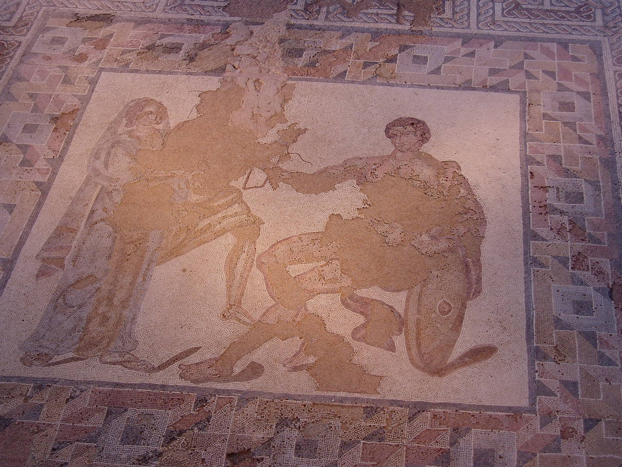 Uno de los mosaicos de la villa de Materno en Carranque (Toledo)